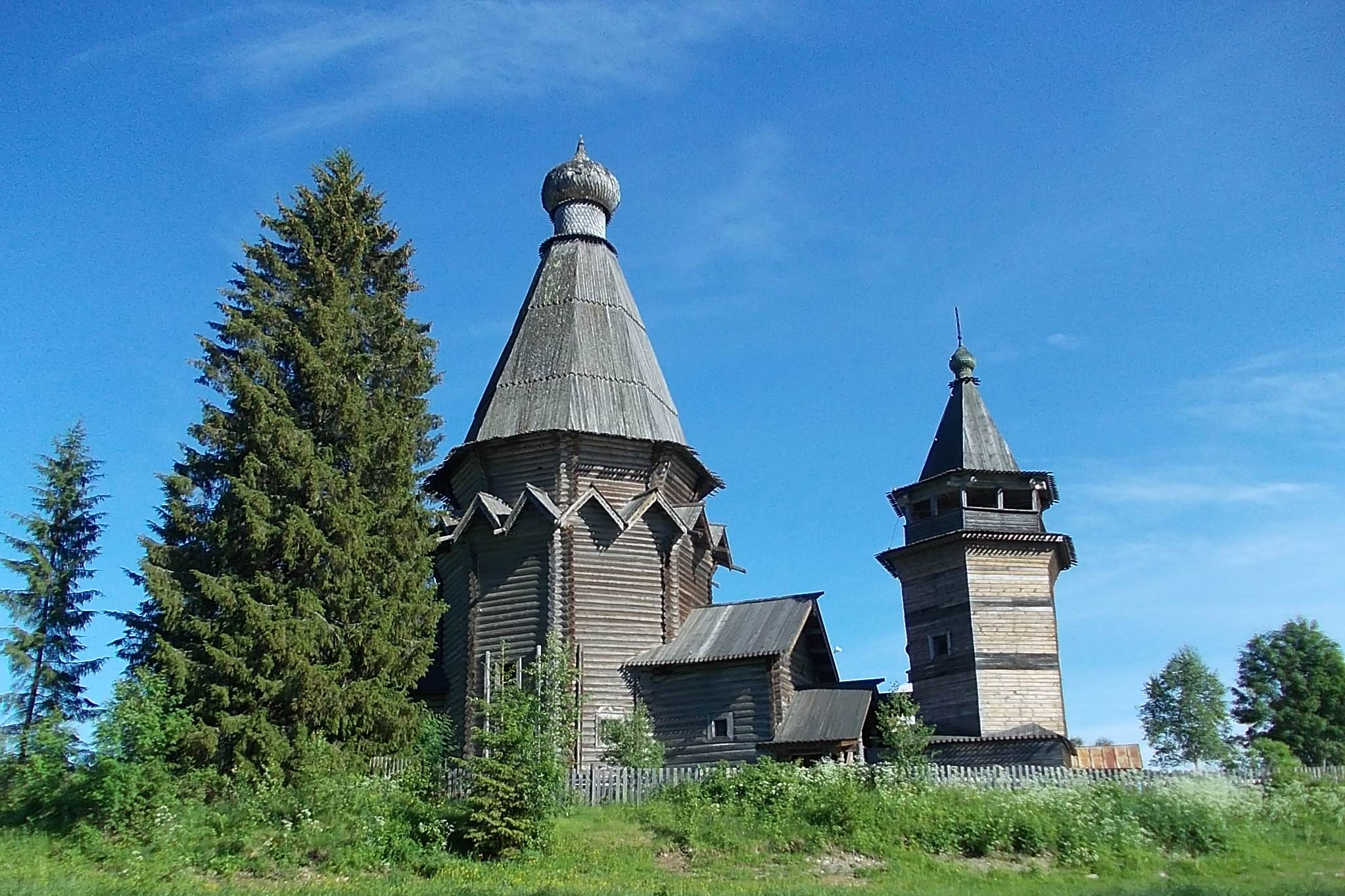 Церковь Николы в д.Согиницы